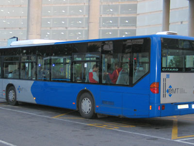 Línea Nº1 de buses de Palma de Mallorca (Ciutat-Port-Aeroport).